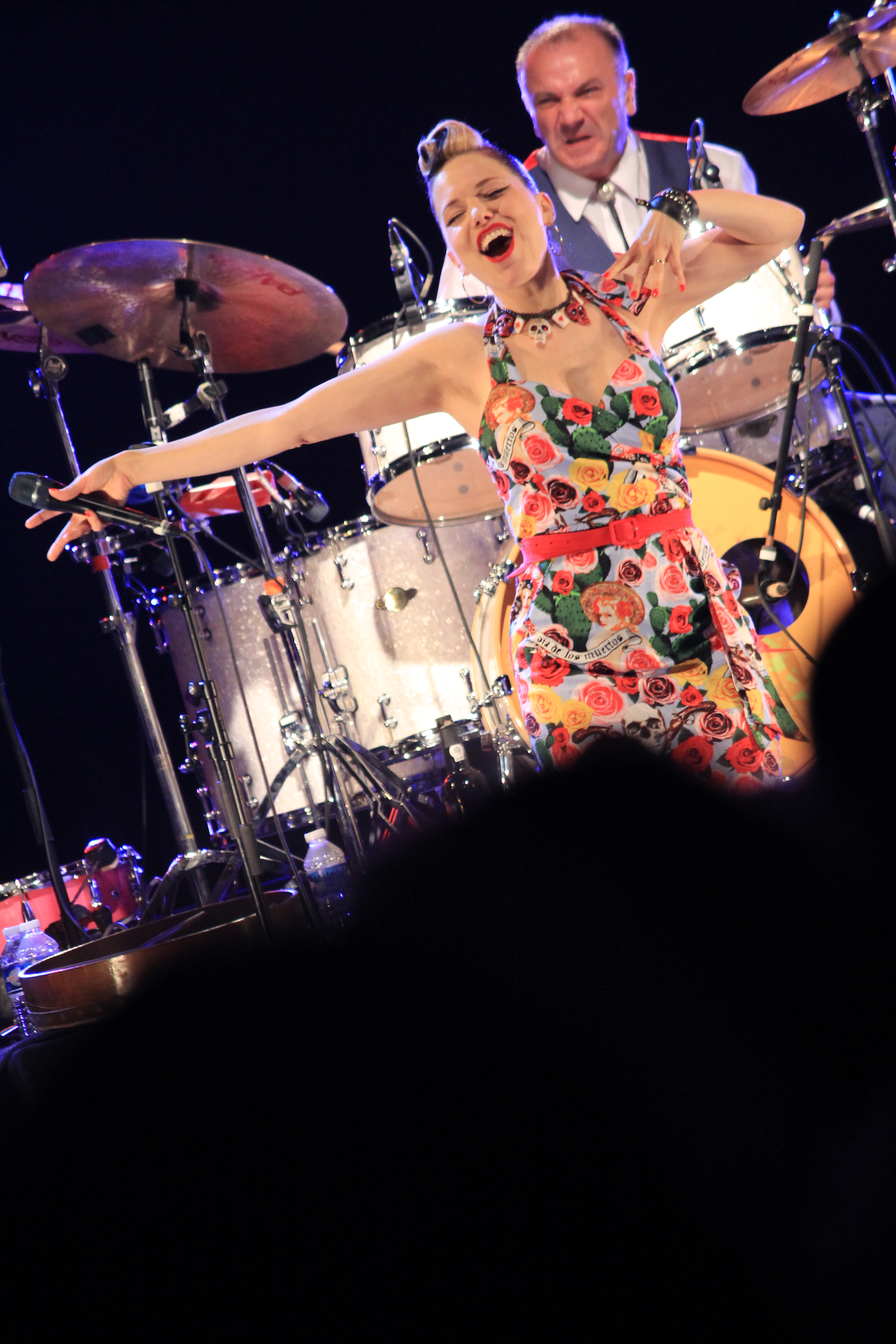 Imelda May pendant un concert lors du festival interceltique de Lorient 2013